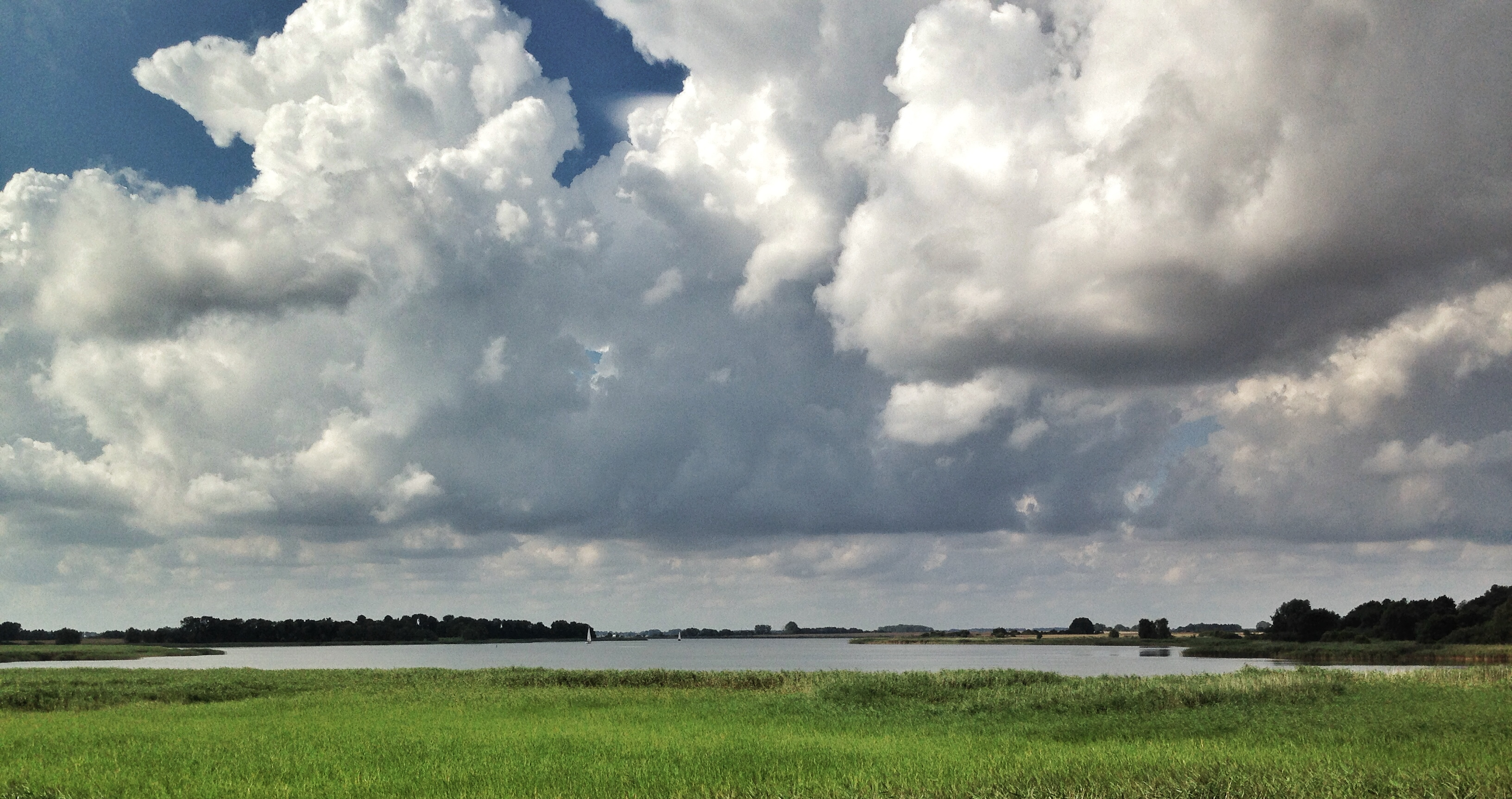 Blick auf die Puddeminer Wiek von der RÜG-K13